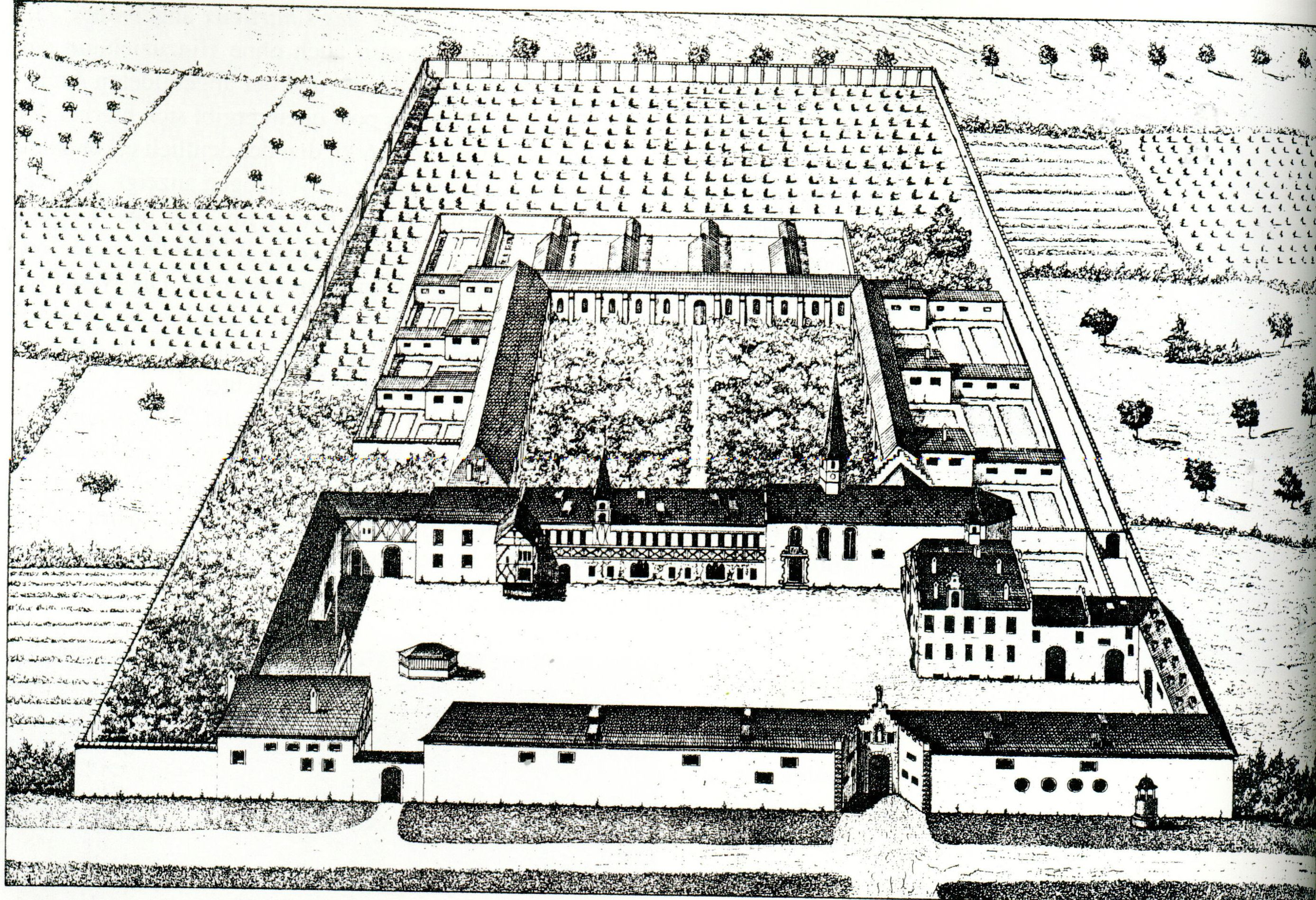 Kartause, Astheim, graphische Ansicht der Klosteranlage.